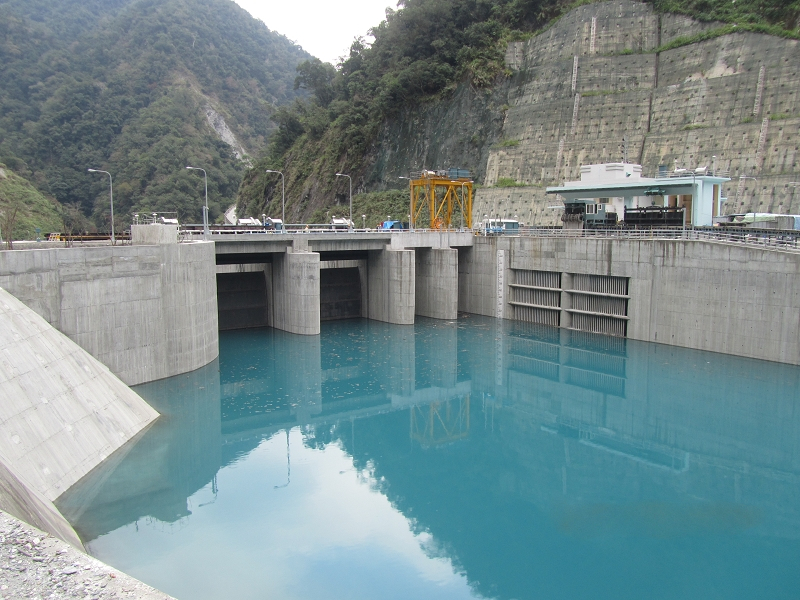 臺灣電力公司東部發電廠-南溪壩